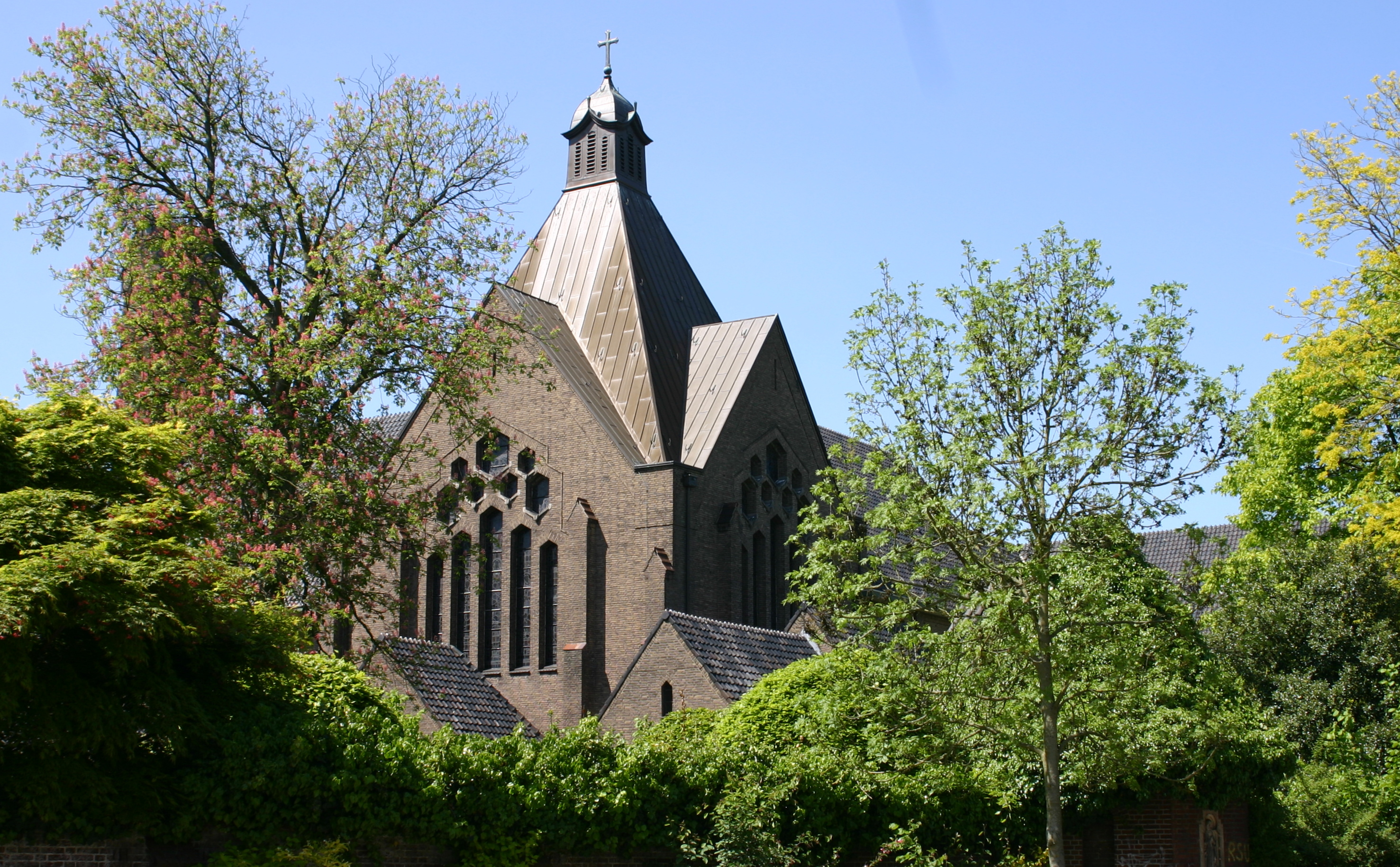 Klooster van de Franciscanessen Penitenten Recollectinnen van de Onbevlekte Ontvangenis. View of the chapel